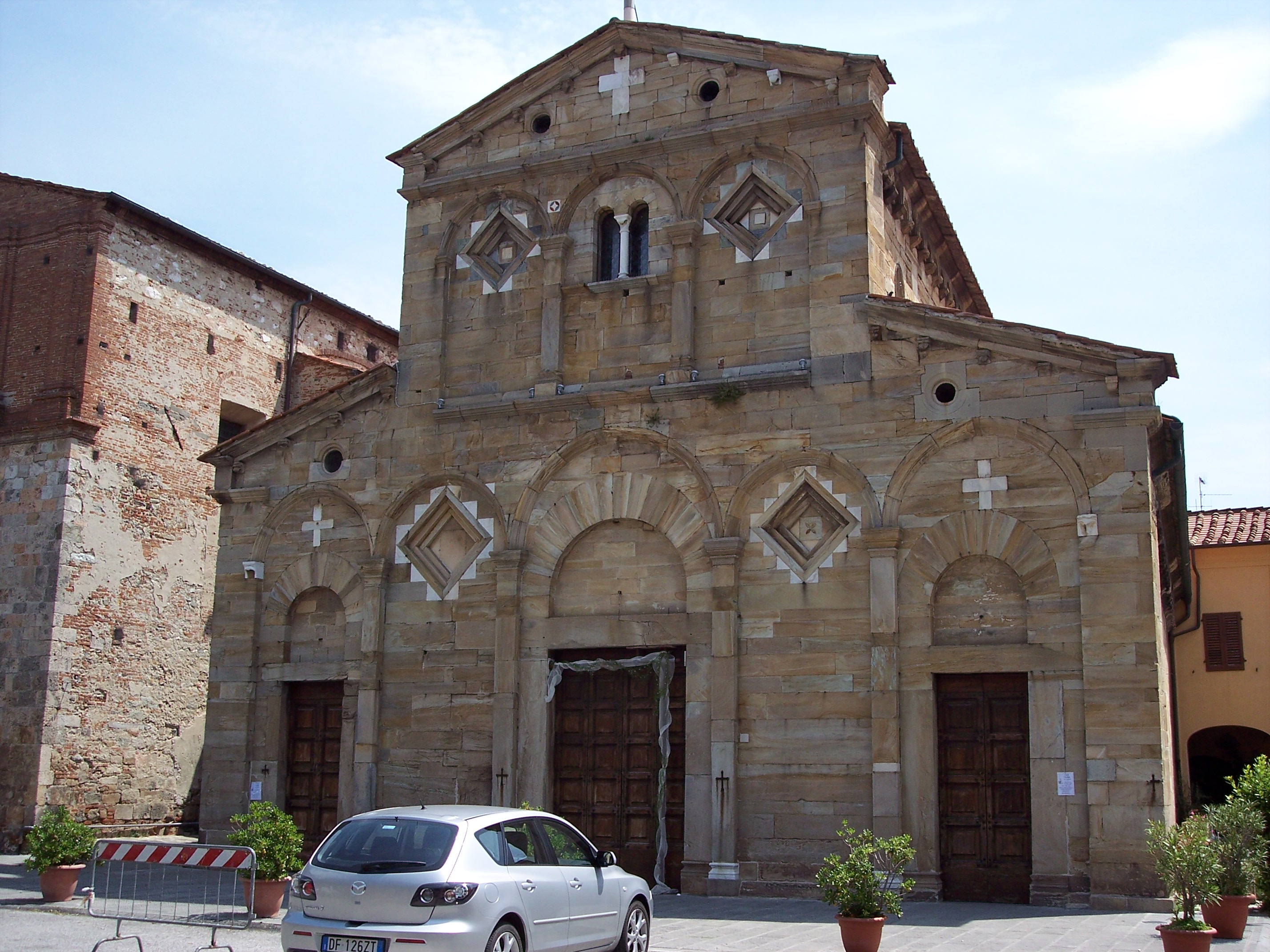 Pieve di Santa Maria a Cascina, PI, in stile Romanico Pisano